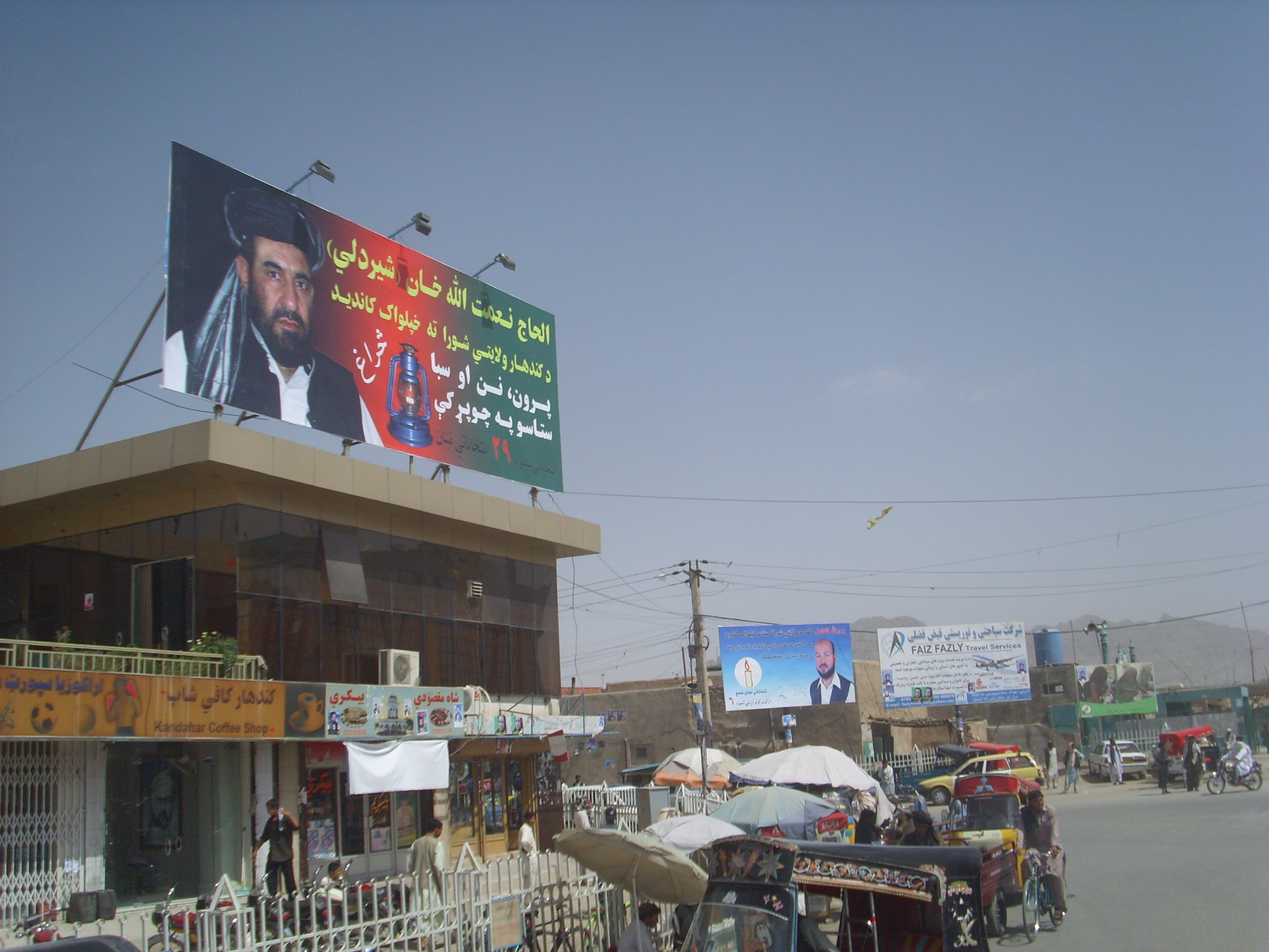 Kandahar